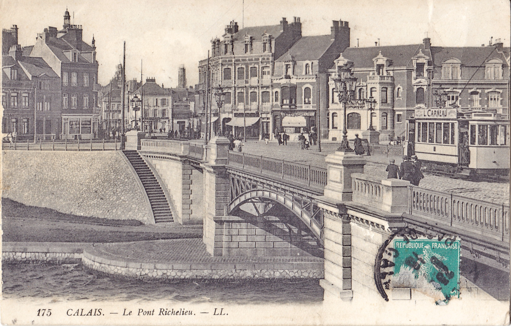 Carte postale ancienne éditée par LL, n°175 :CALAIS - Le Pont Richelieu